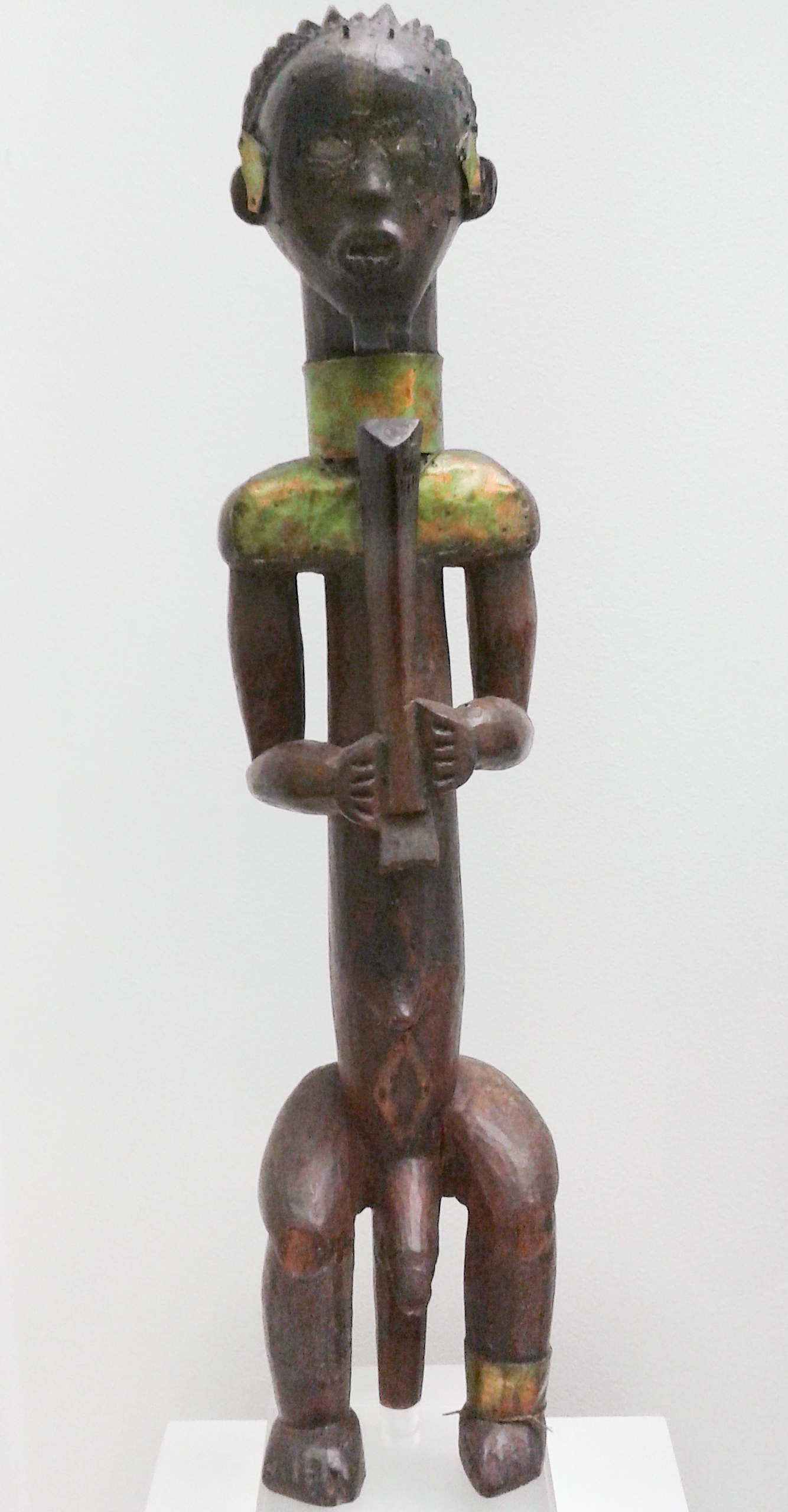 Povo Ngumba: Figura de ancestral masculino, guardião dos túmulos dos antepassados, que em geral traz um chifre entre as mãos, onde guarda substâncias mágicas. Acervo de etnologia africana e afrobrasileira do Museu Nacional/UFRJ - Rio de Janeiro, Brasil.